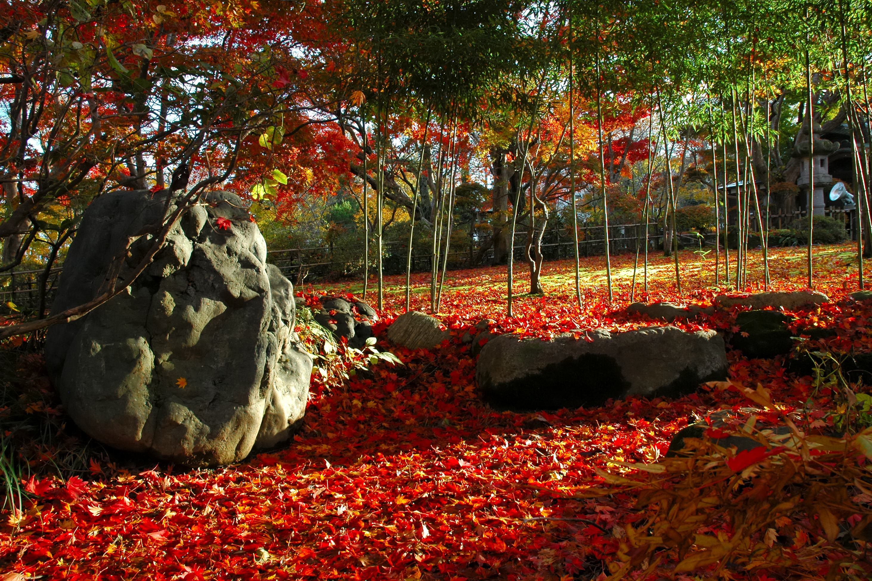 Momijien, Nagaoka, Niigata (長岡市（旧ja:越路町）のもみじ園)